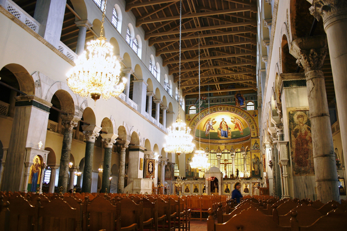 ハギオス・デメトリオス聖堂内部 St Demetrios Church (St James) Thessaloniki 投稿者撮影